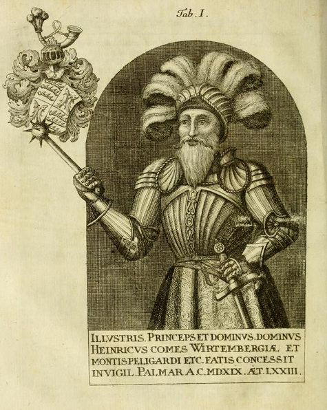 Graf Heinrich von Württemberg, aus Sattler Graven, Bd. 4, Ulm 1768